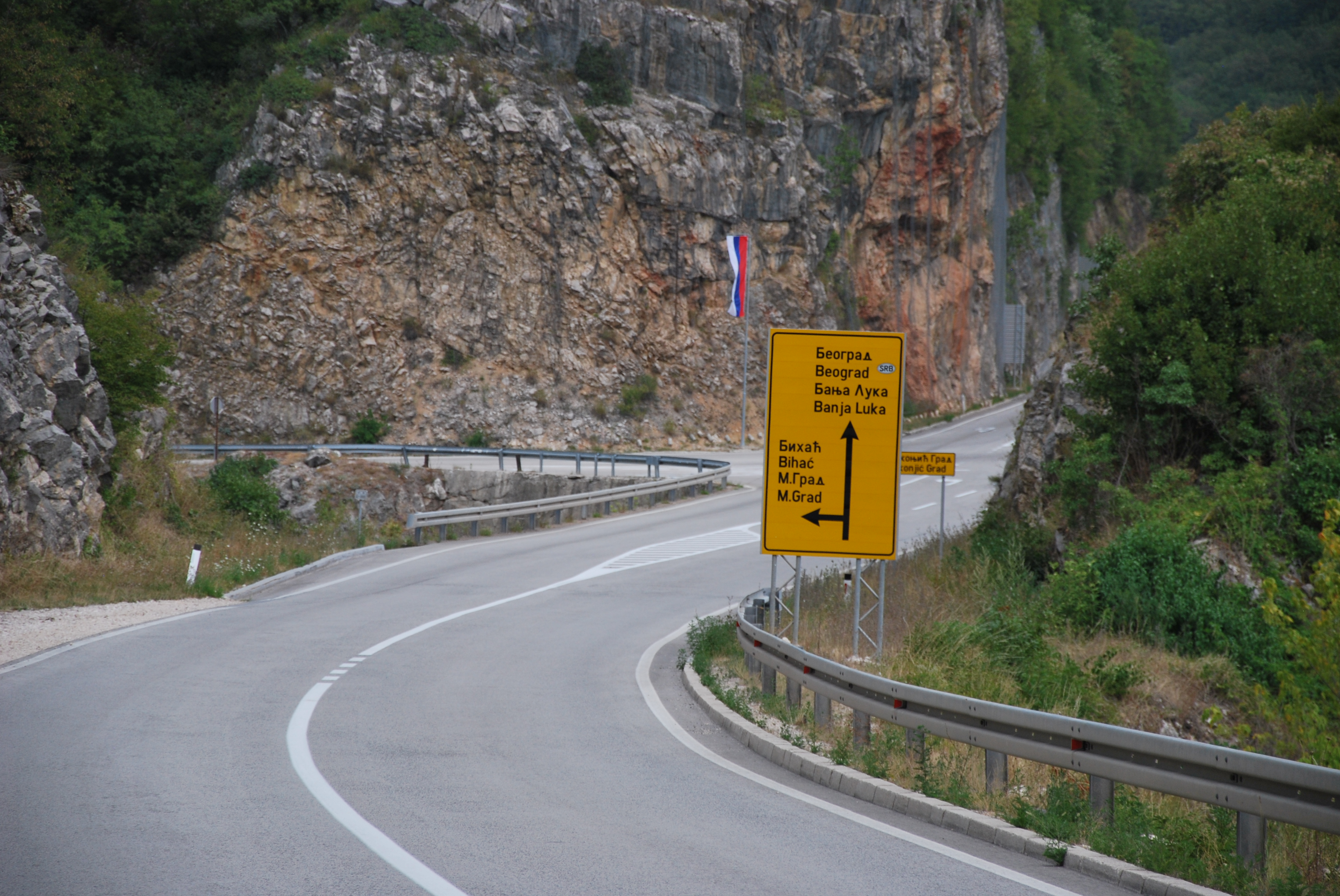 Magistralstraße M16 in Bosnien-Herzegowina, kurz vor dem Gebiet der Gemeinde Mrkonjić Grad